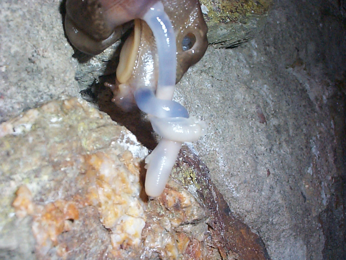 Nacktschnecken bei der Paarung